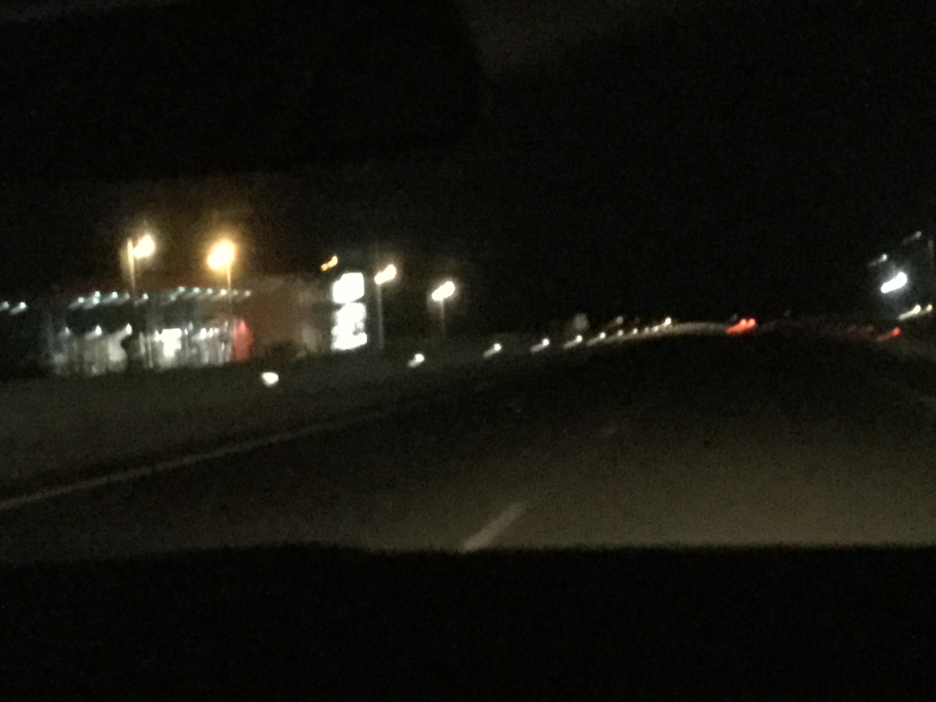 Το τμήμα της ΝΕΟ Τρικάλων Πύλης της νύχτα